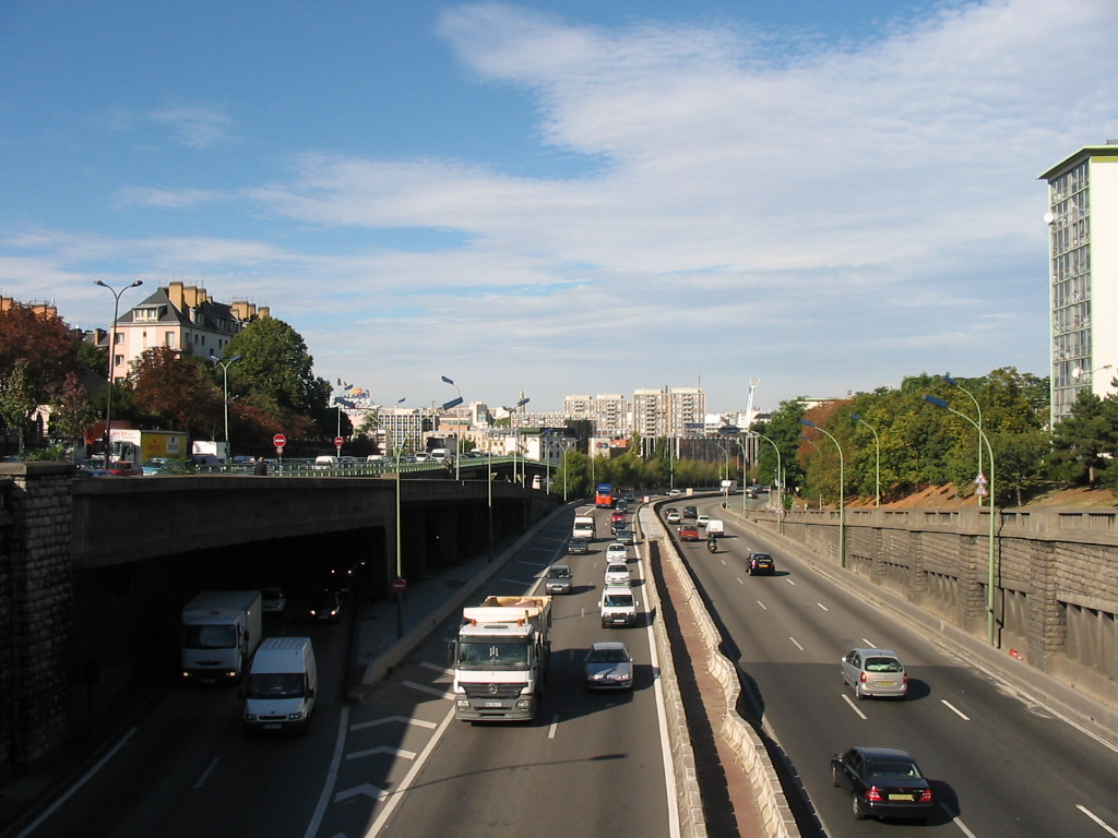 Le boulevard Porte d'Italie. À gauche, Gentilly. Je suis l'auteur du cliché pris à la rentrée 2005